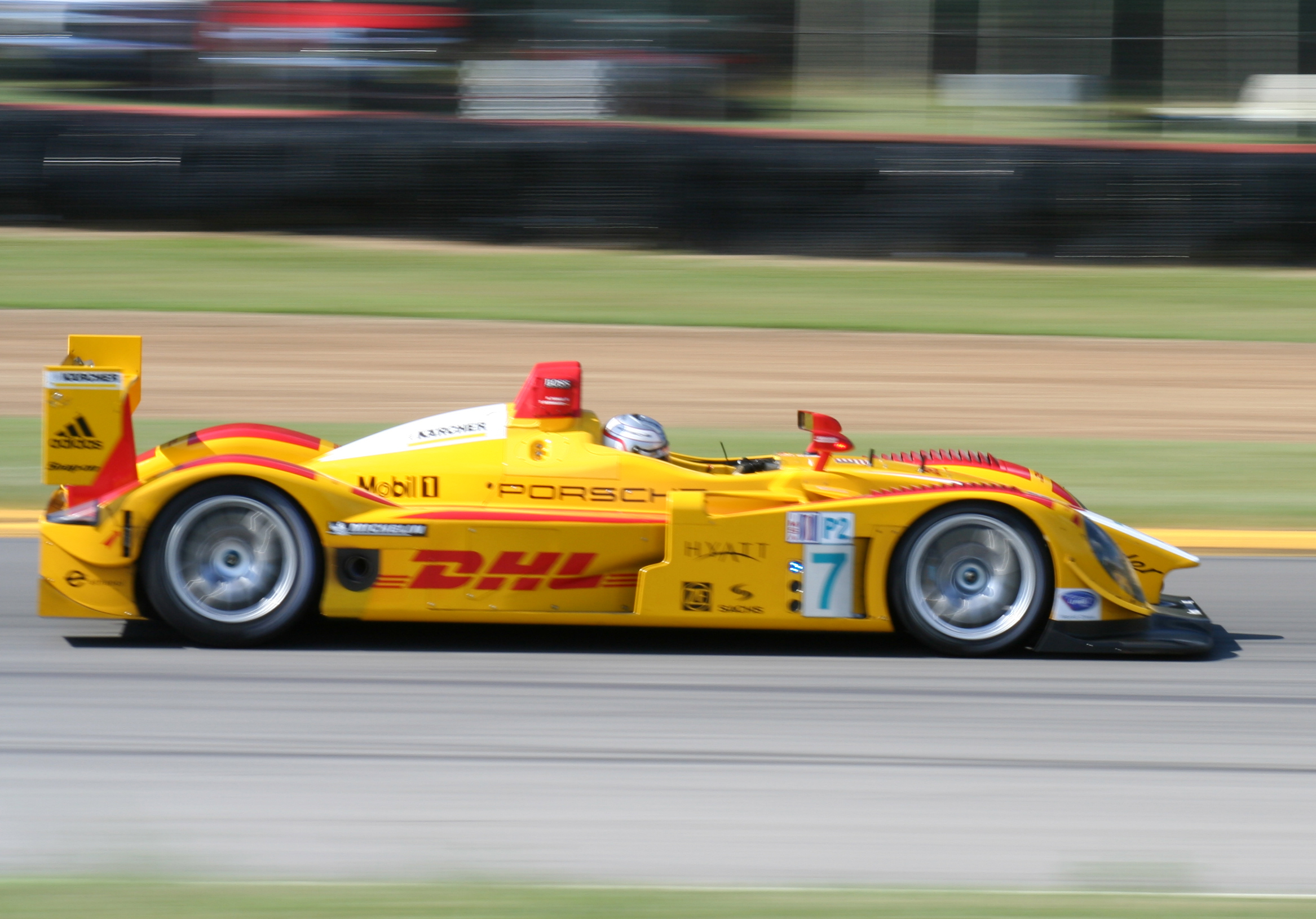 A Penske Porsche RS Spyder